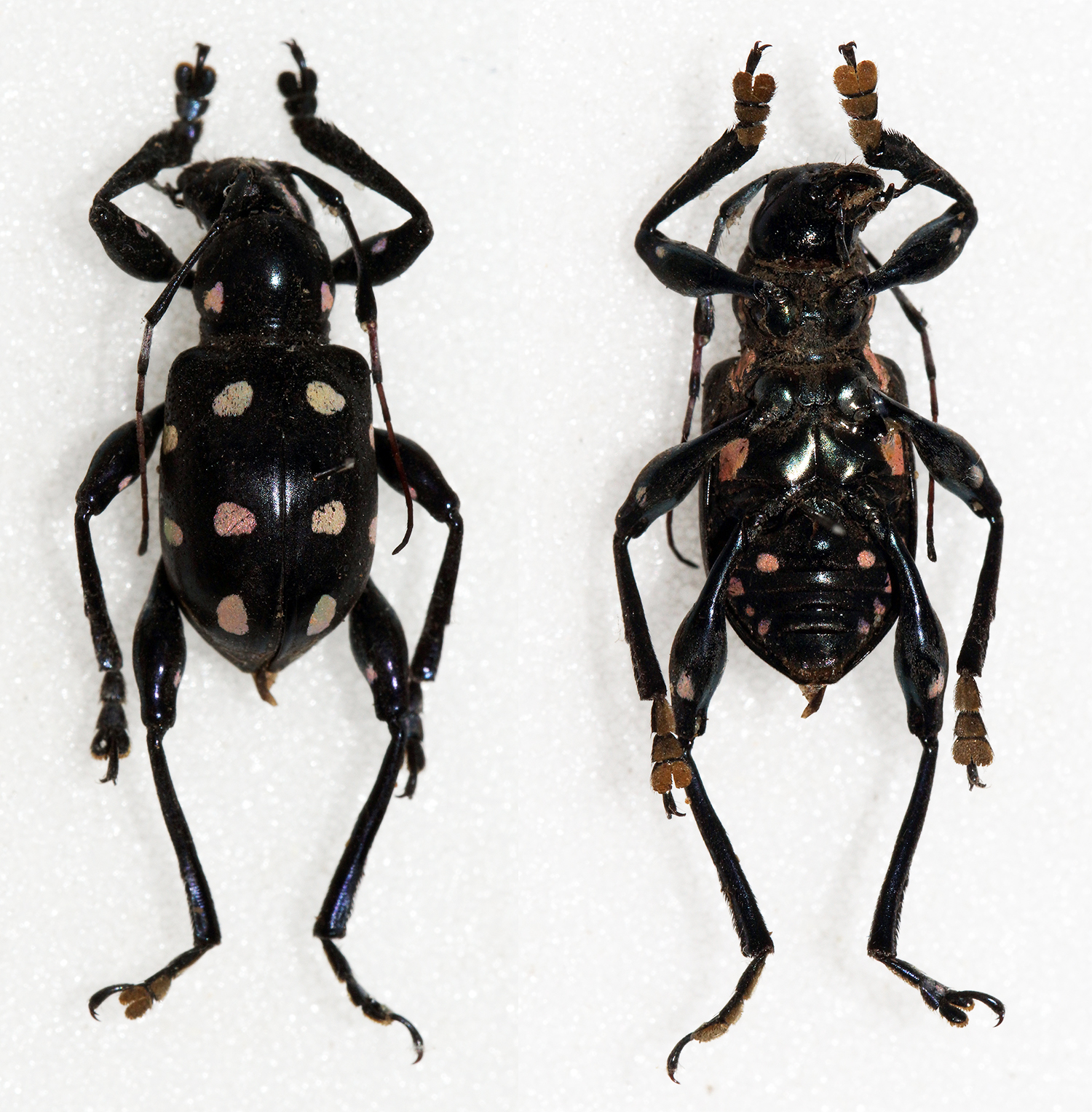 Heller, 1923 Sex: Male Data: 05-2014 - Mt.Halcon - Mindoro - Philippines Size: 13.5mm